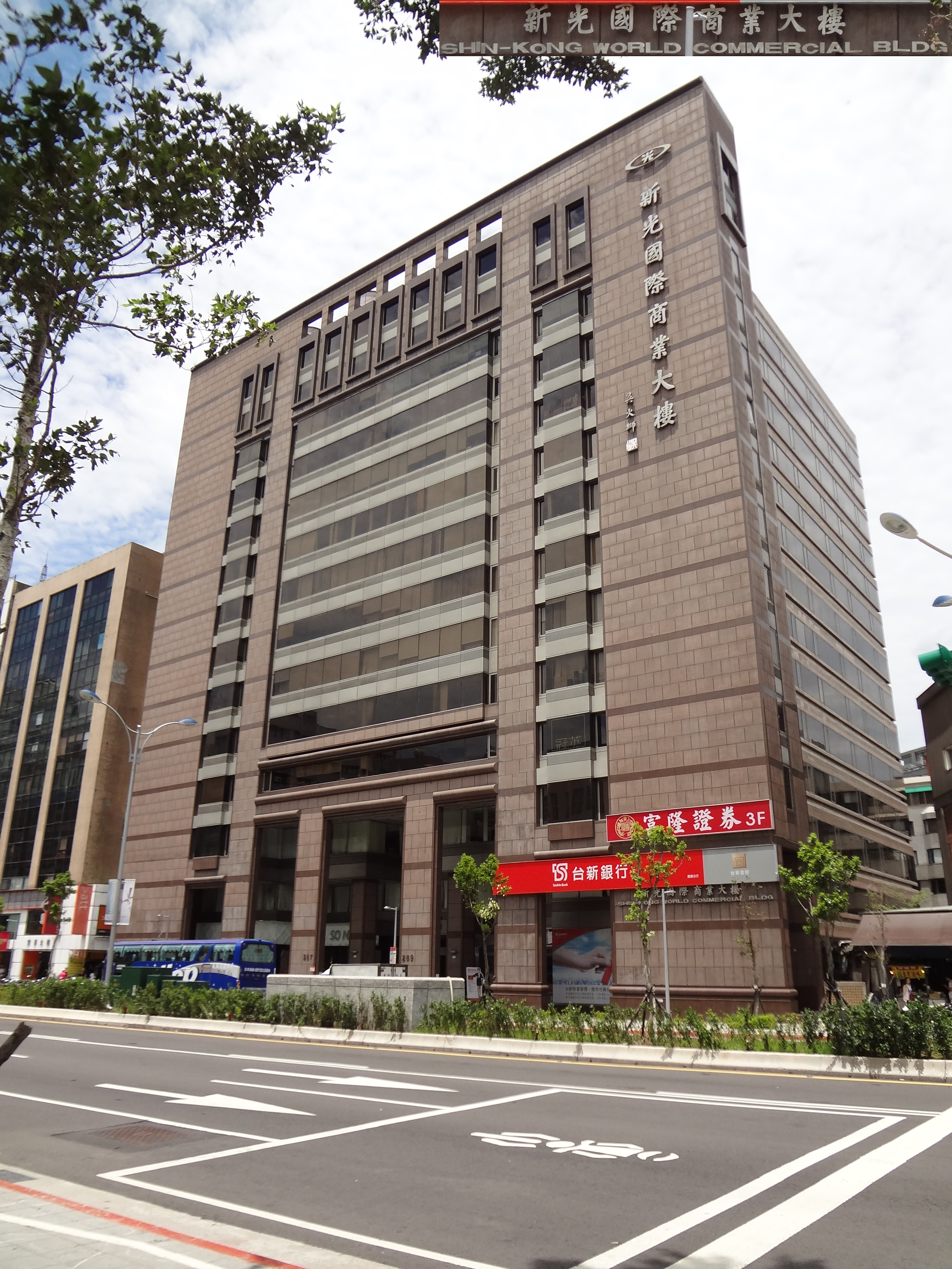 新光國際商業大樓，位於臺灣臺北市松山區南京東路三段287、289號。